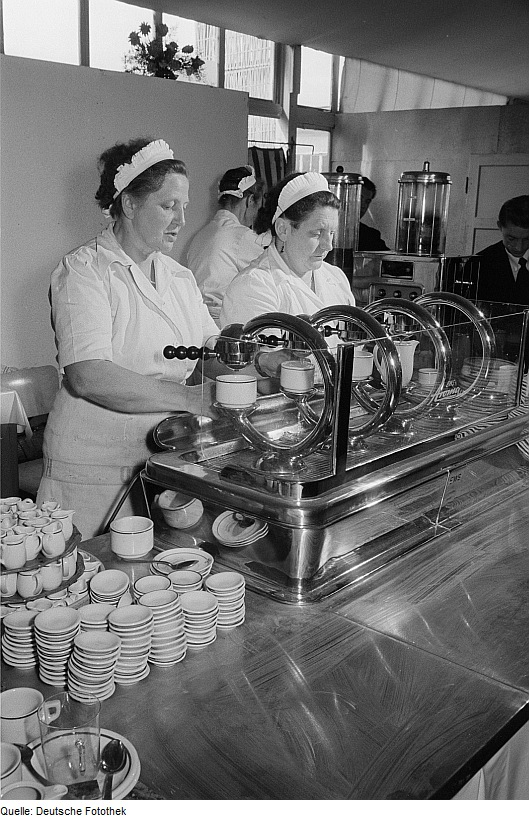 Original image description from the Deutsche FotothekPersonal einer HO Elektro-Großküche der Leipziger Herbstmesse 1954 an einer Kaffeemaschine